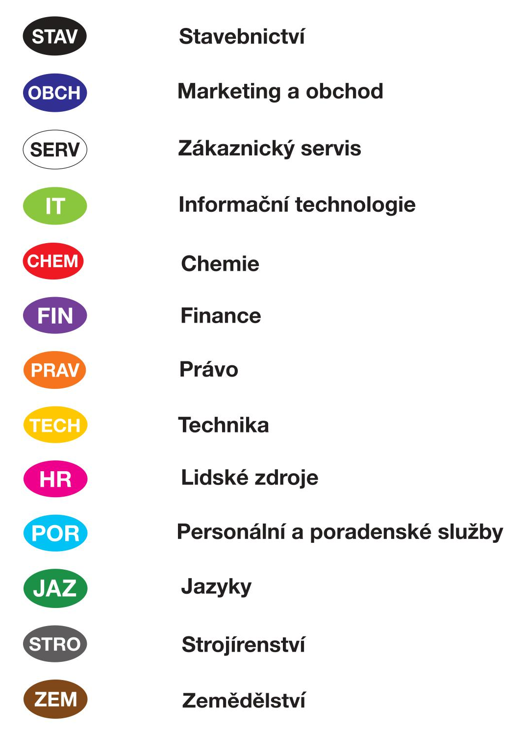 Oficiální barevně rozdělení na veletrhu JobChallenge